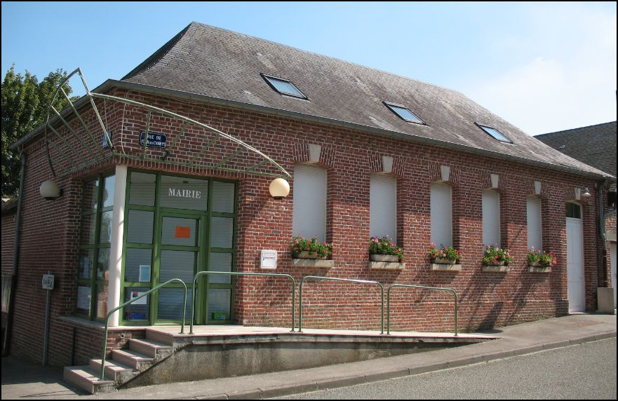 Ecole des garçons incluse dans la mairie rénovée en 1999